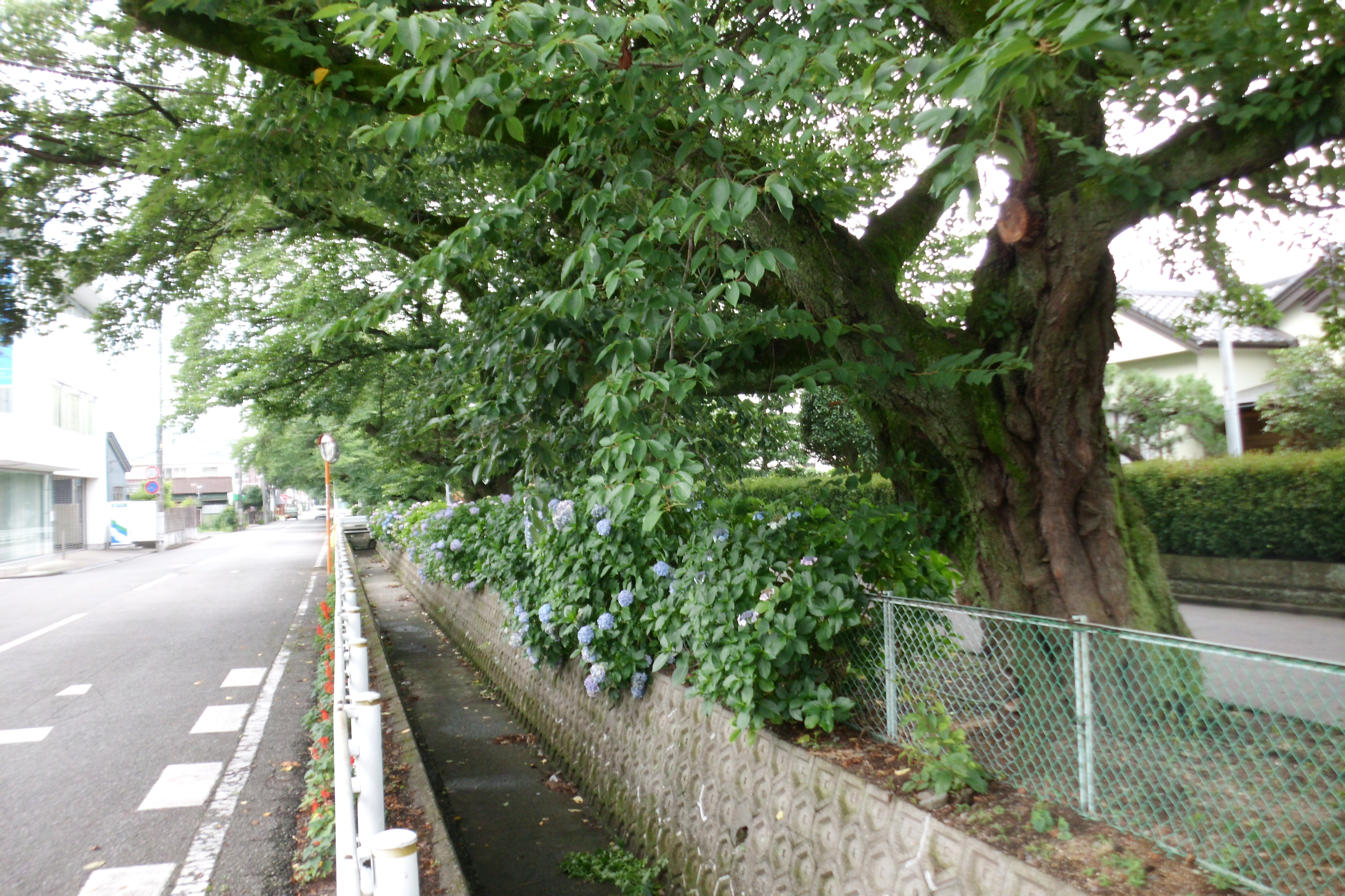 栃木県宇都宮市を流れる新川。二宮尊徳によって造られたことから二宮用水の総称もある。 桜並木通り（渇水しており、桜の季節でないため紫陽花が咲く）